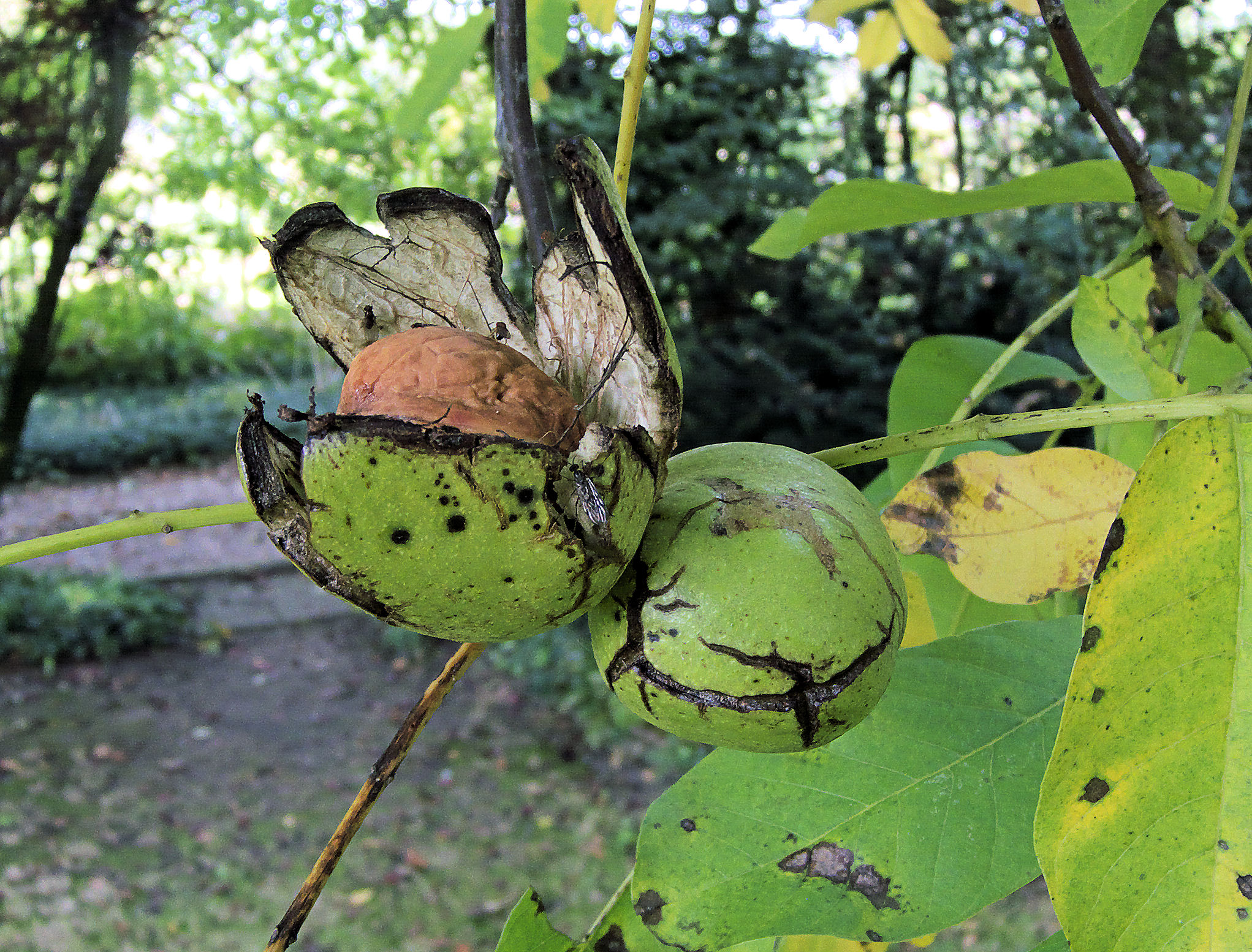 Juglans regia, rijpe walnoot 'Buccaneer'